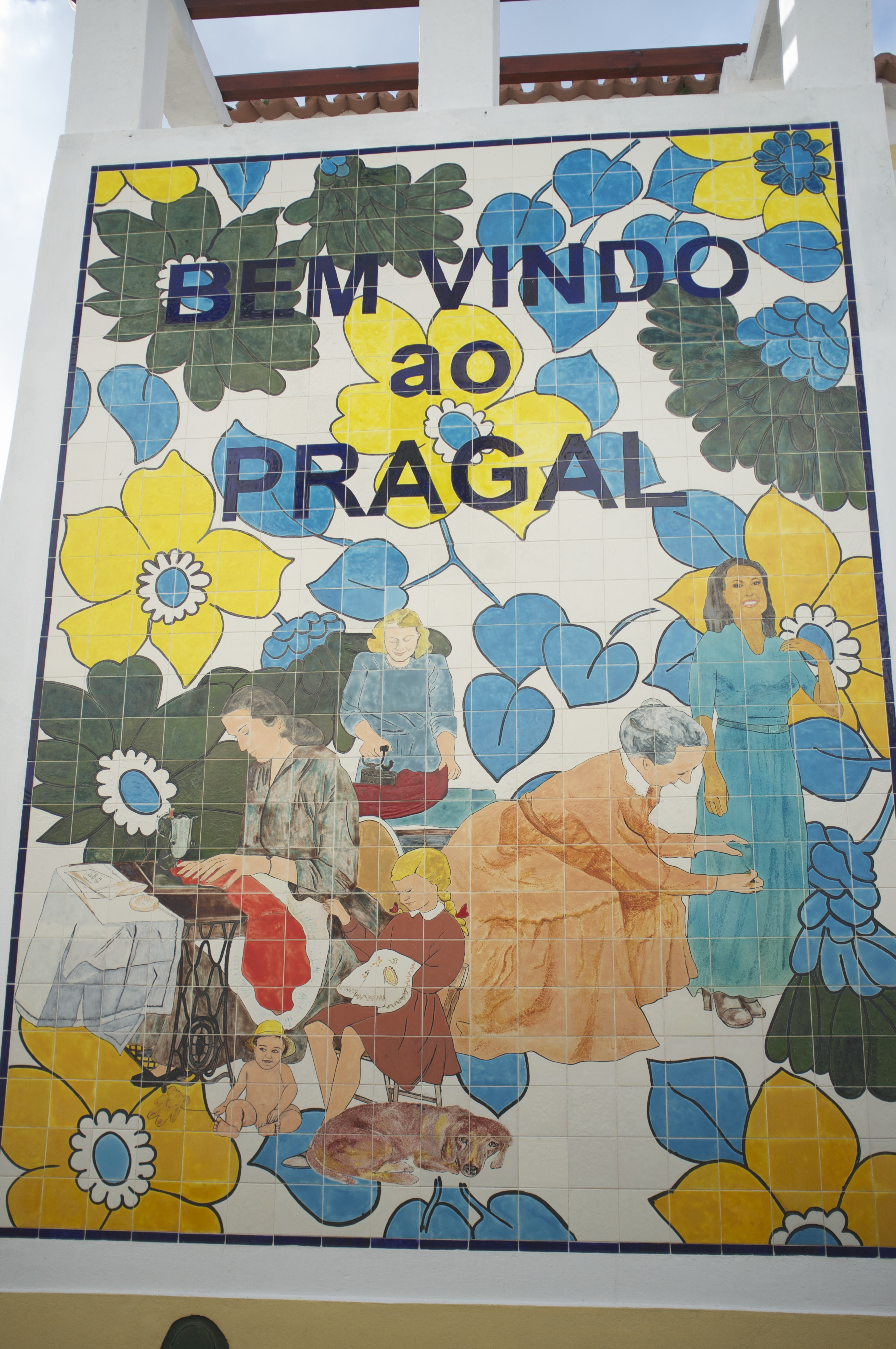 Lisbon